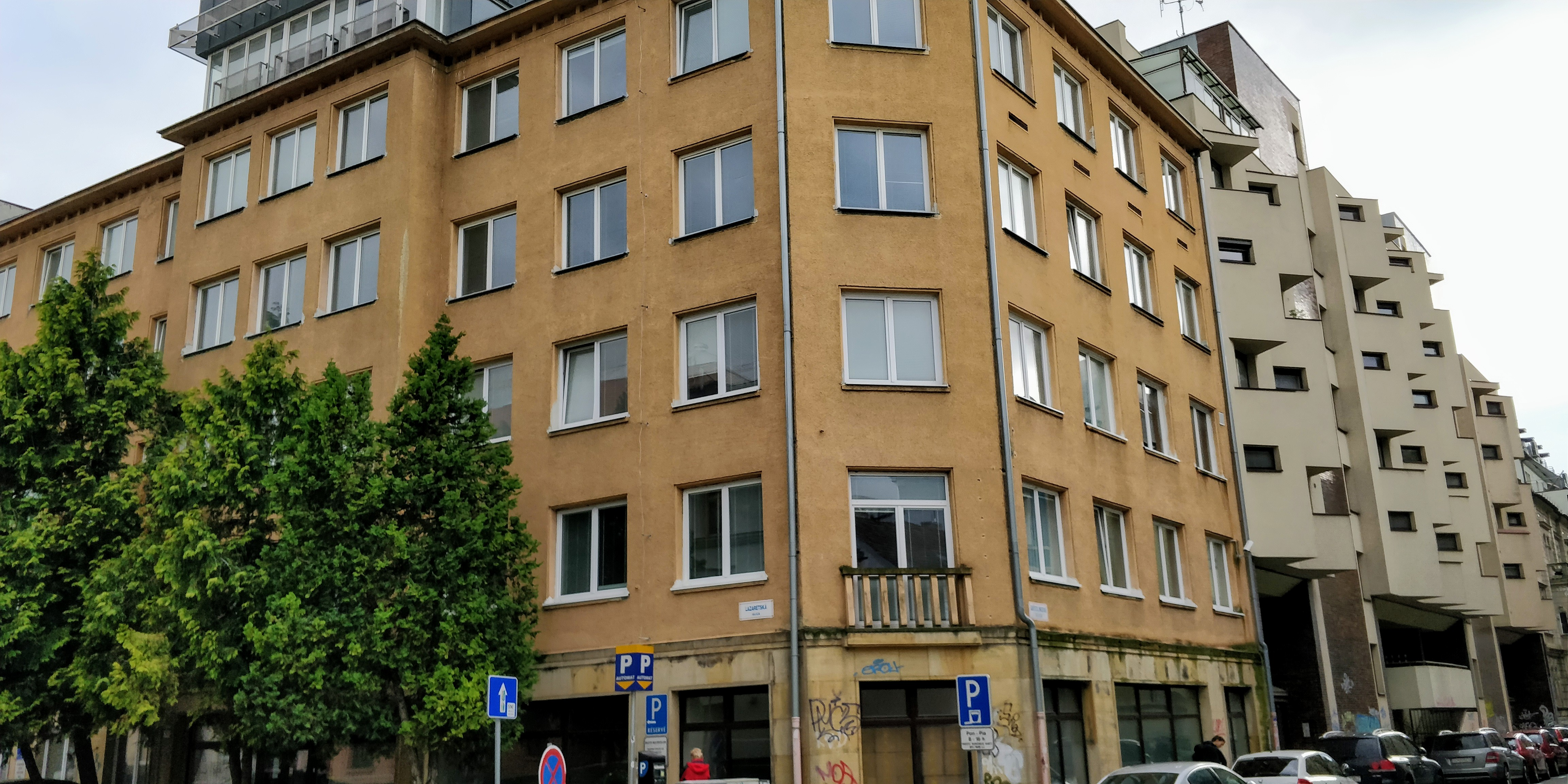 Lazaretská 26, Bratislava, Slovakia